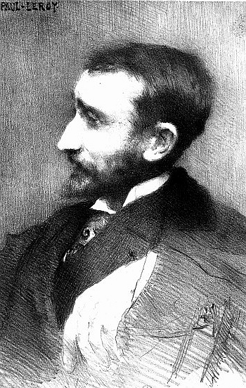 Portrait d'Auguste Dorchain (1857-1930)